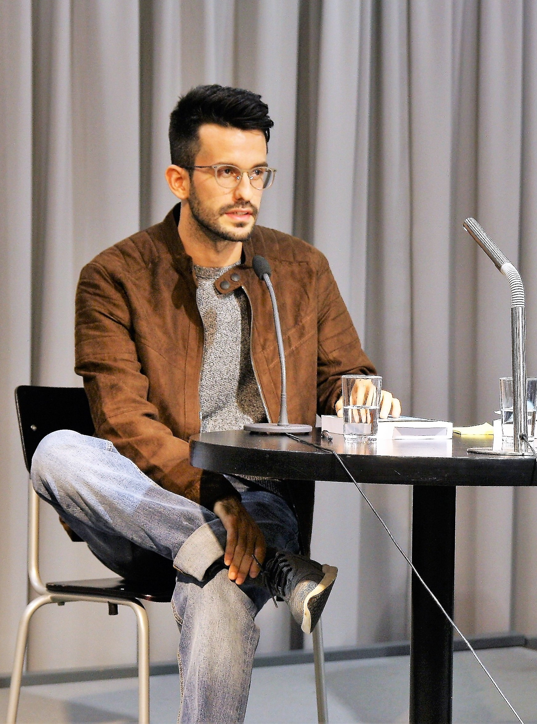 Der Schweizer Autor Dan Shambicco bei einer Lesung in Lörrach im November 2018